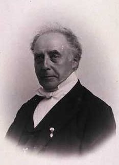 Biblioteksmand Carl August Elberling (16.Apr.1834-15.Jun.1925), Danmark